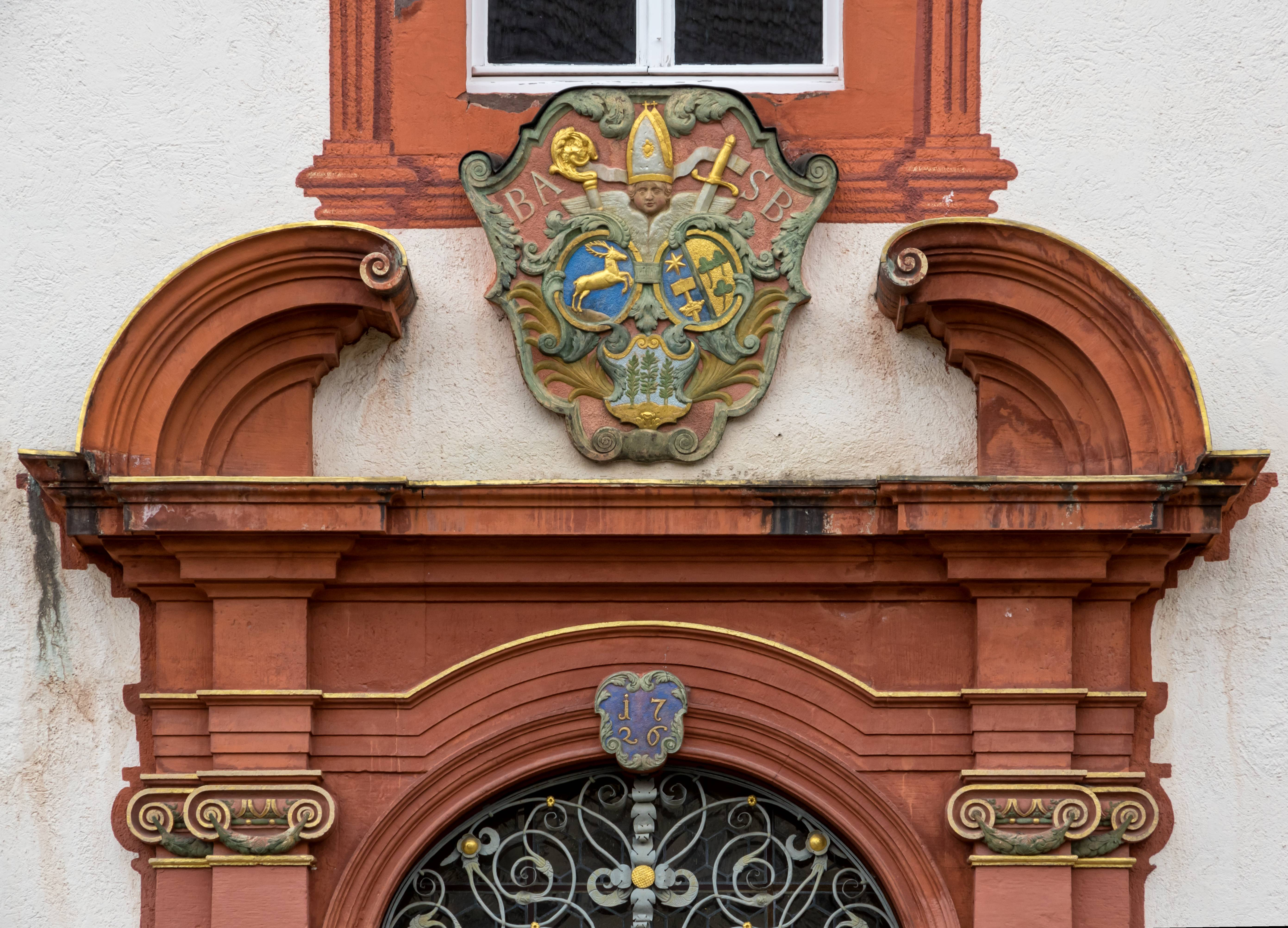 Schloss Bonndorf im Schwarzwald, Klosterwappen und Wappen Blasius Bender, Abt von St. Blasien